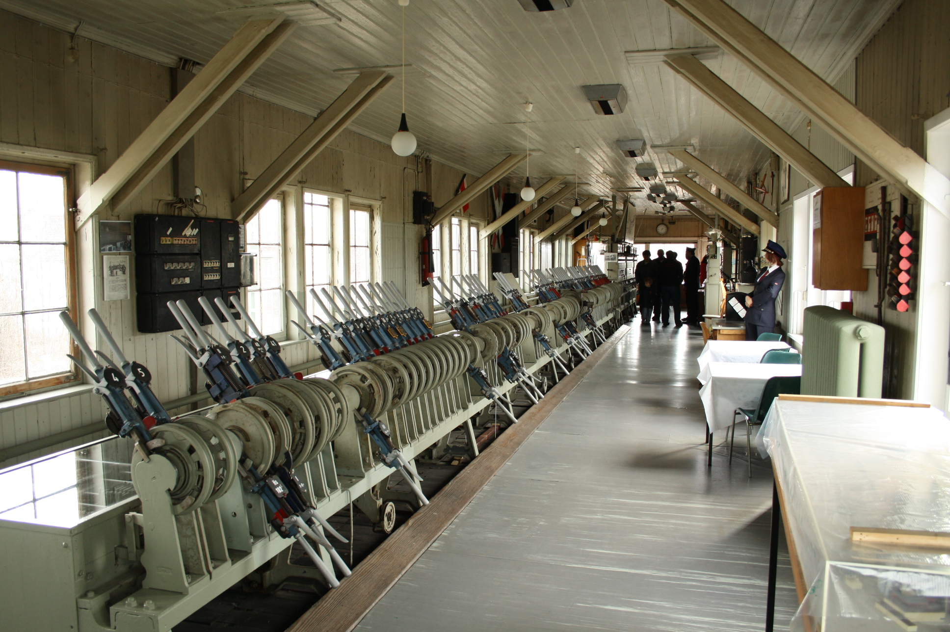 Museumsstellwerk LPF in Lehrte/Region Hannover/Germany